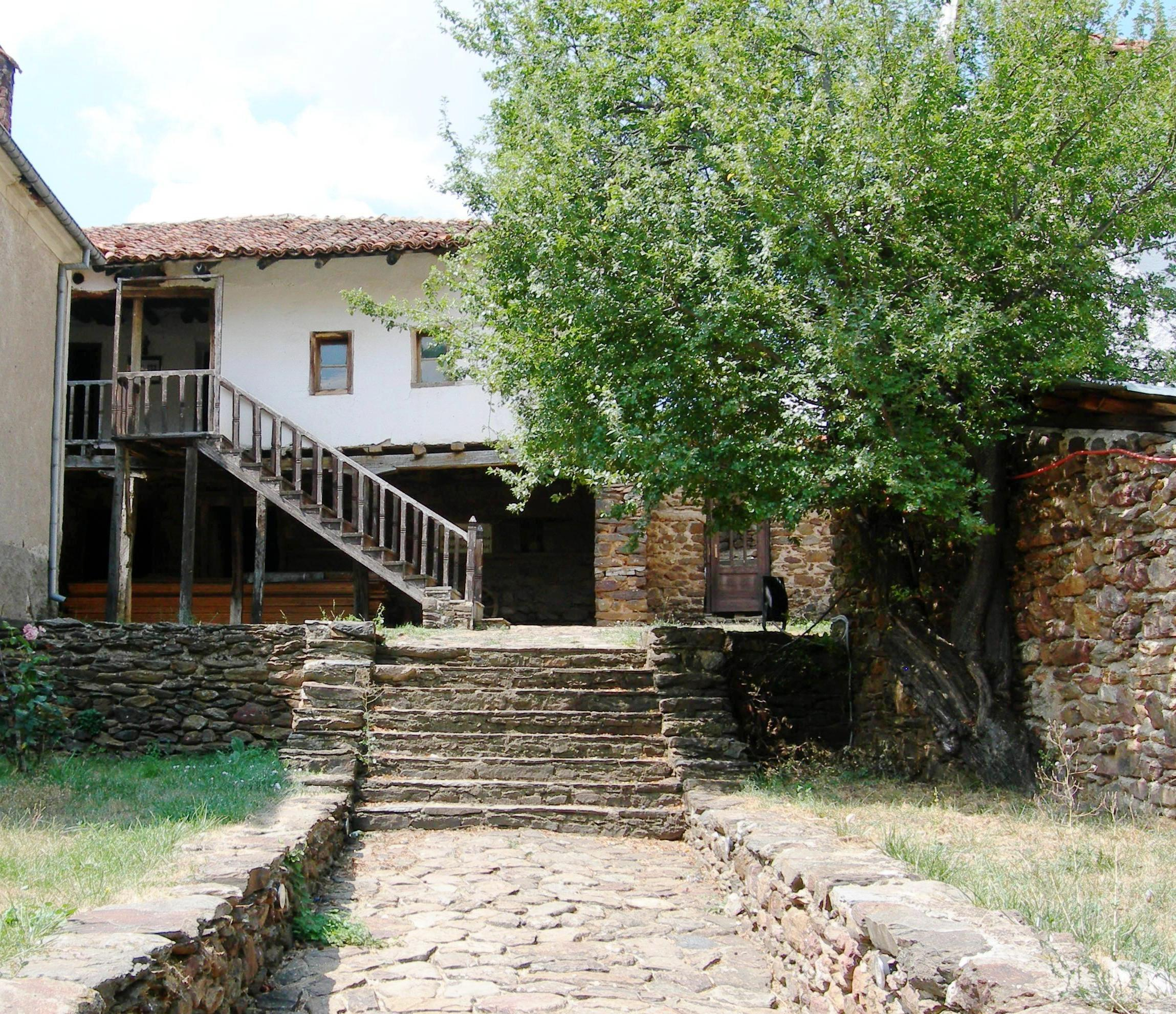 το σπίτι στην Στάτιστα (Μελάς) όπου σκοτώθηκε ο Παύλος Μελάς